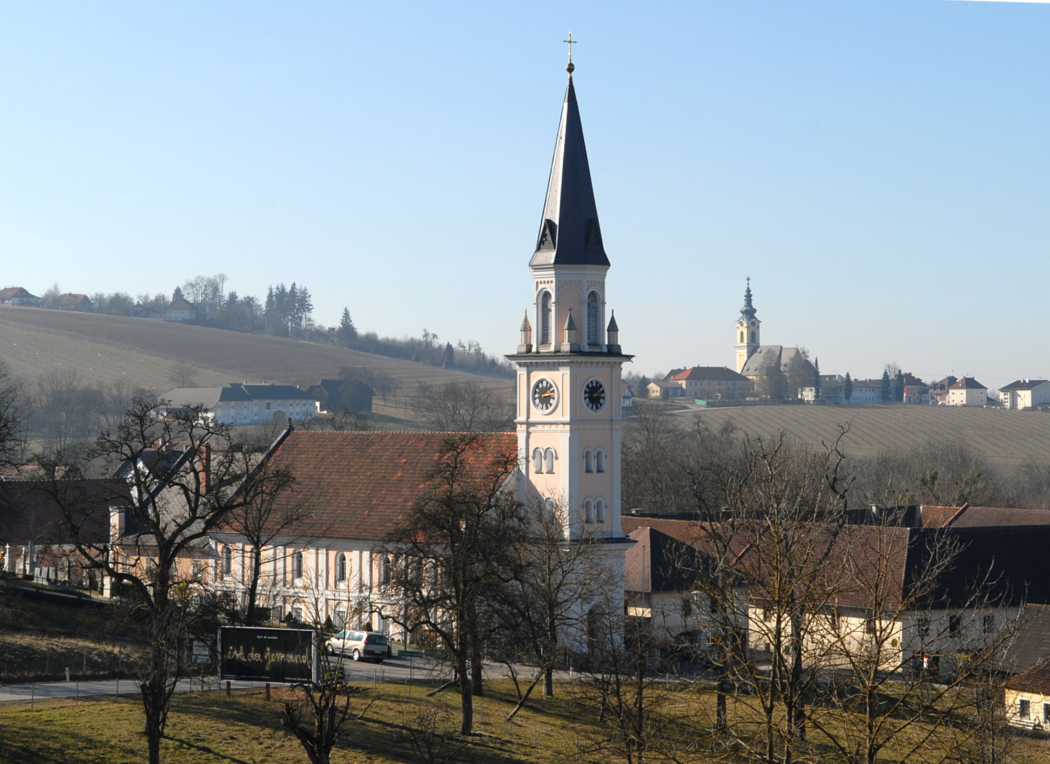 Evangelische Kirche in Unterscharten in Oberösterreich, ursprünglich hölzernes Bethaus 1782, Pfarrhaus 1783, heutige Kirche als Bethaus 1819, Turmbau 1900; im Hintergrund die katholische Kirche Oberscharten